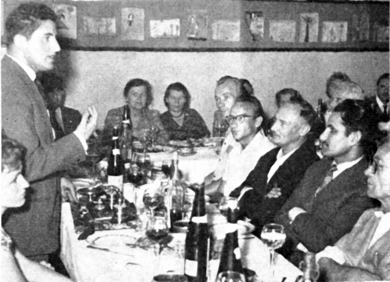 UK 1959. La konstanta kongresa sekretario s-ro Gian Carlo Fighiera (staranta) en la adiaŭa vespermanĝo, kiun la L.K.K. aranĝis je lia honoro, dankas pro la kunlaboro kaj pro la donacita bela memoraĵo (luksa skribilaro).